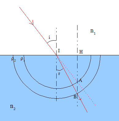 Schéma construction de Descartes pour la réfraction (image personnelle) Catégorie:Schéma de physique